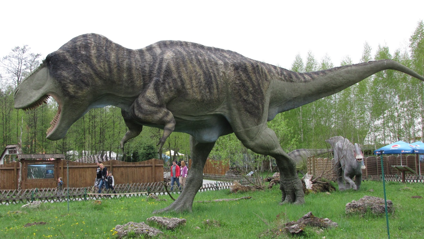 Dinozaury w Juraparku w Bałtowie. Tyranozaur był dwunożnym mięsożercą z masywną czaszką utrzymywaną w równowadze przez długi ogon. Mierząc niemal 12,3 metrów długości i ważąc około 7-8 ton, pozostaje jednym z największych znanych drapieżników lądowych wszech czasów. Wymarł podczas wielkiego wymierania kredowego (ok. 66 mln lat temu) (Wikipedia)